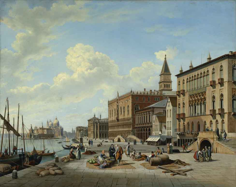 Ansicht der Riva degli Schiavoni in Venedig, [1880/90], 95 x 121 cm, Salzburg Museum, Inv.-Nr. 6090/49